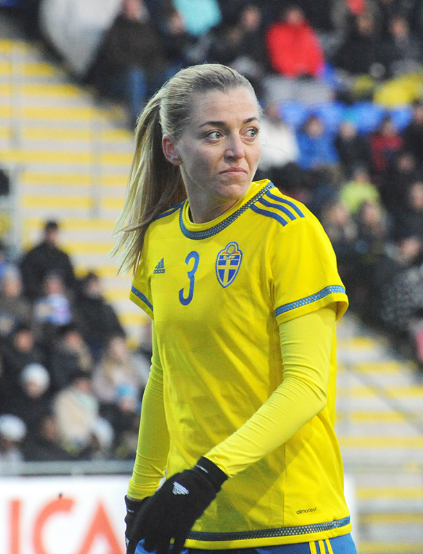 a_42_0811